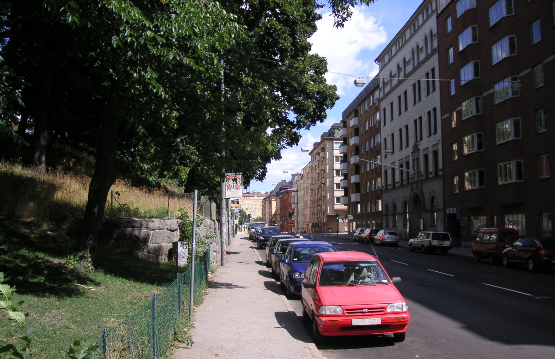 Frejgatan i Stockholm